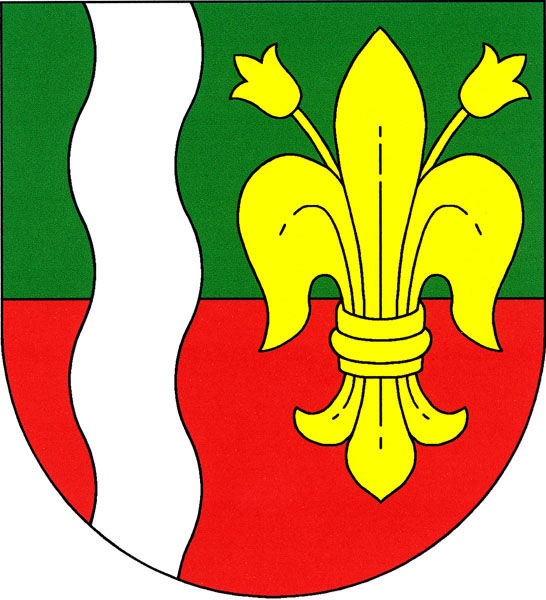 Znak obce Tuhaň (okres Mělník)